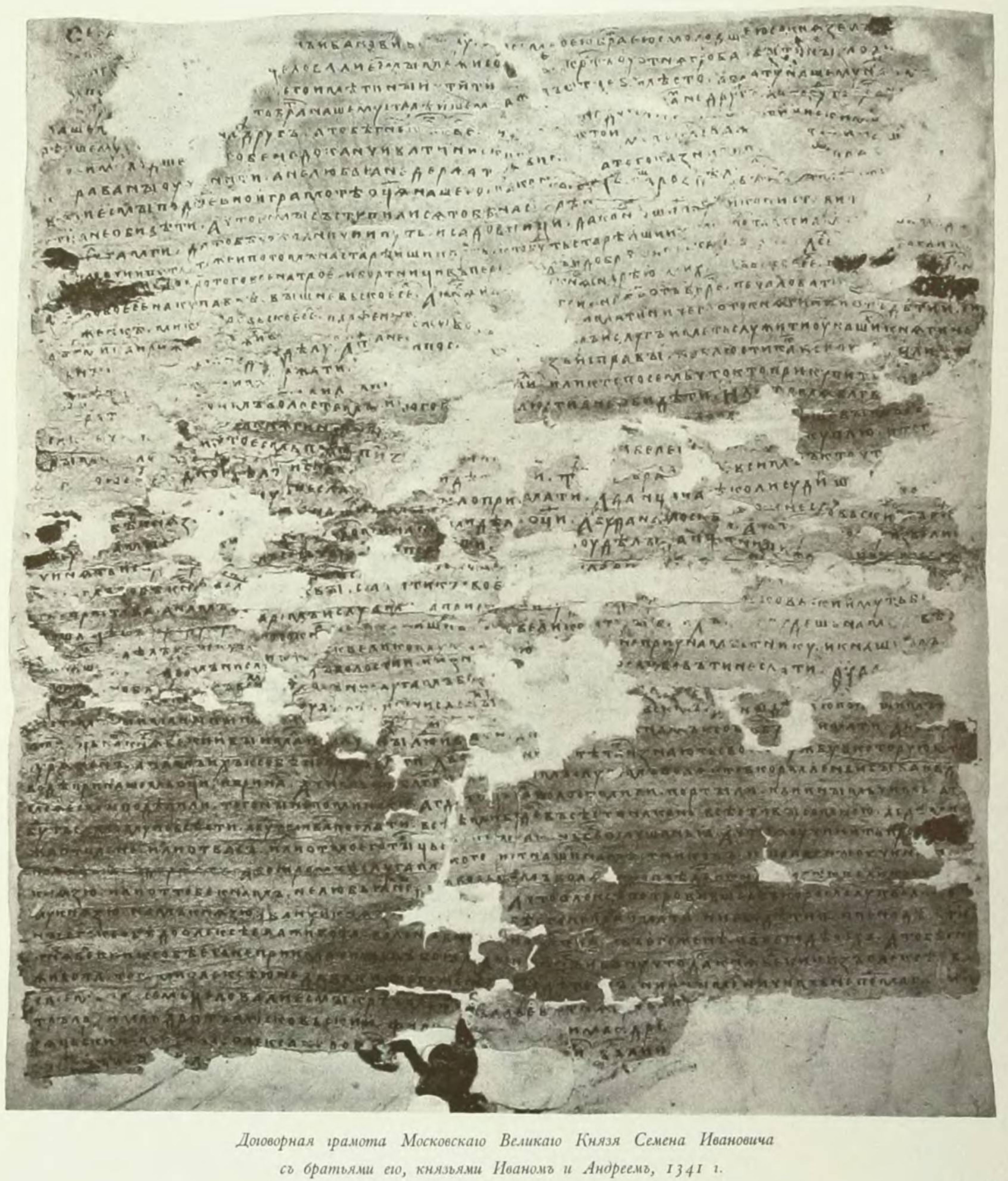 Великокняжеская, царская и императорская охота на Руси